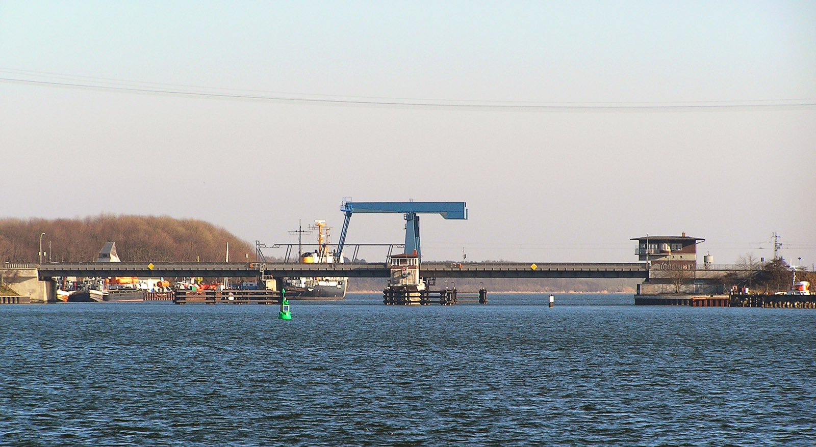 Beschreibung: Ziegelgrabenbrücke im Profil Fotograf: Darkone, 31. März 2005